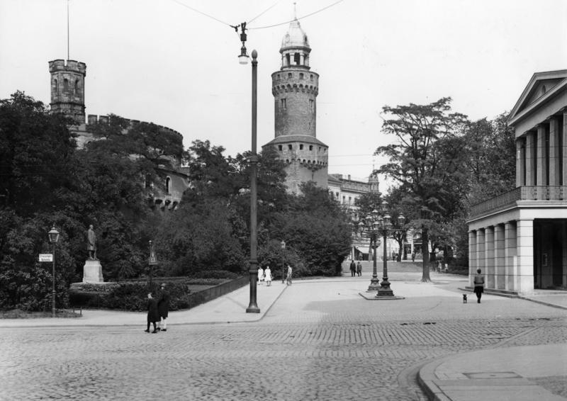 Görlitz (Niederschlesien) Demiani-Platz